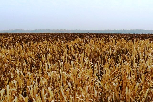 Фото путешествия по Беларуси.